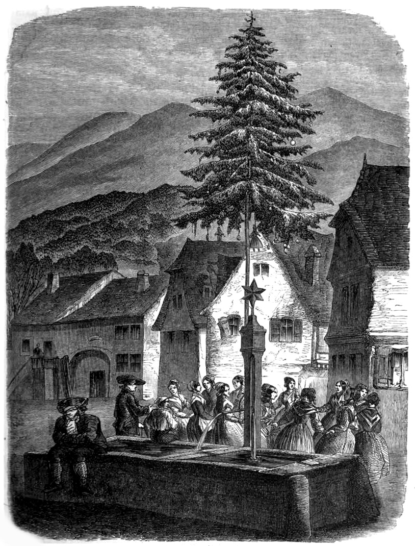 Neujahrstag in den Vogesen